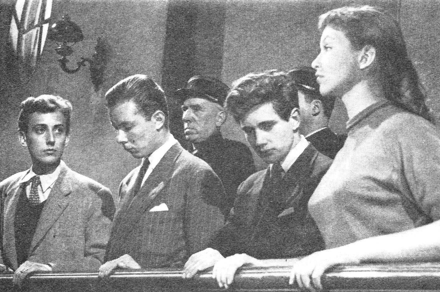 Jacques Fayet, Clément Thierry, Jacques Chabassol e Marina Vlady a processo in "Prima del diluvio" (Cayatte, 1954)